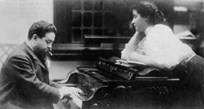 Laura Albéniz with his father Isaac Albéniz